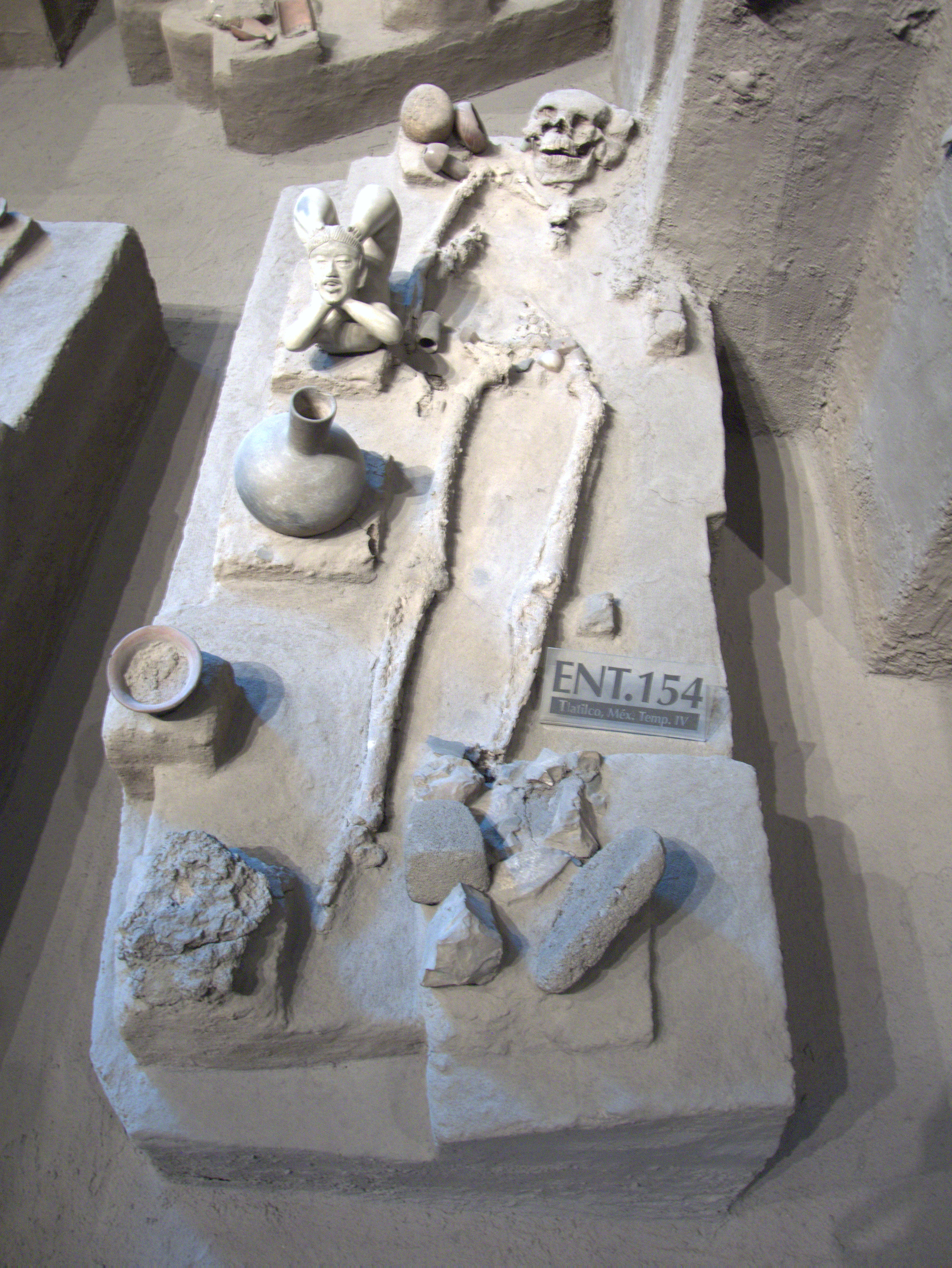 Reconstitución del entierro 154 del templo IV del sitio arqueológico de Tlatilco del Estado de México ; se nota una vasija de cerámica en forma de acróbata, reconsitutida en la posición en que fue encontrada (reconstitución expuesta en el Museo Nacional de Antropología de México).